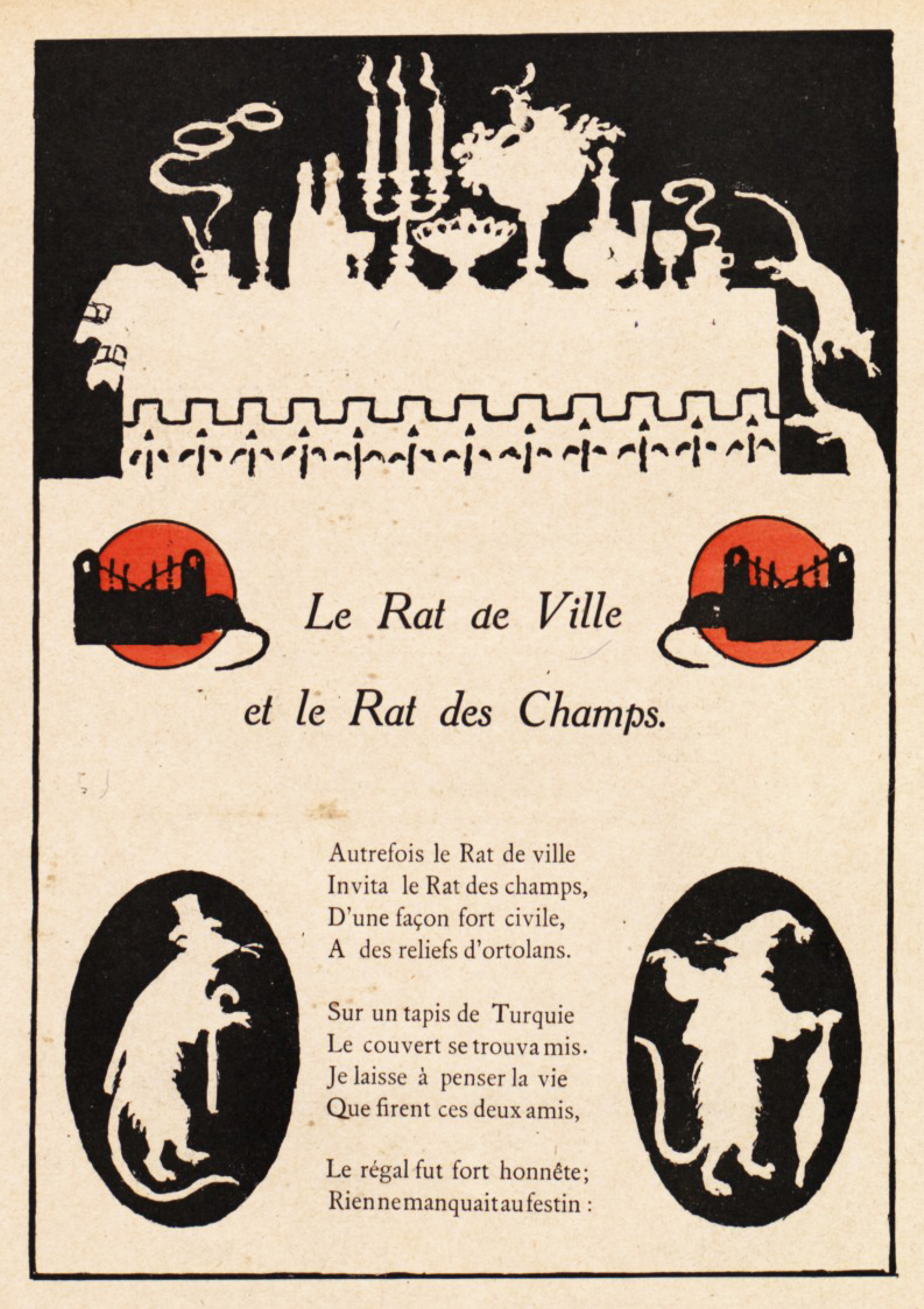 Dessin réalisé par Henri Avelot représentant la fable Le Rat de ville et le Rat des champs de Jean de La Fontaine et extrait du livre " Dix fables d'animaux, illustrations en silhouettes humoristiques aux dépens des humains " (Paris, édition Henri Laurens, 1932).